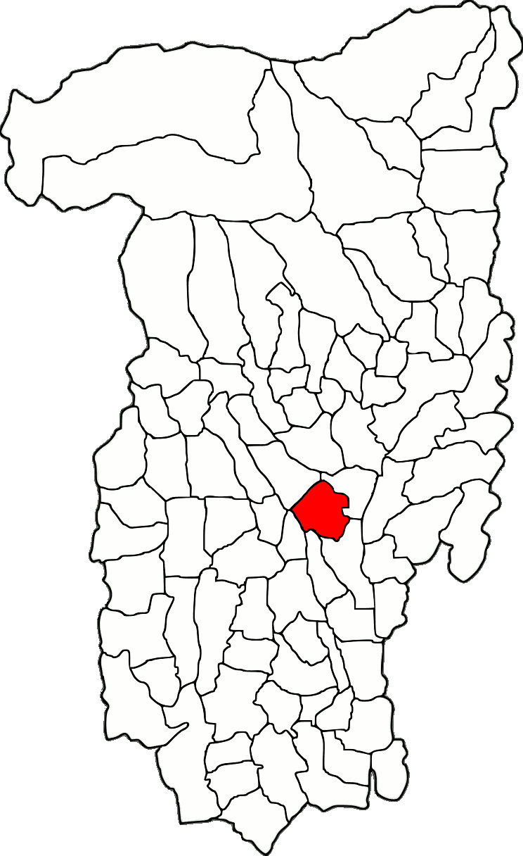 Lage der Gemeinde Șirineasa im Kreis Vâlcea (RO).